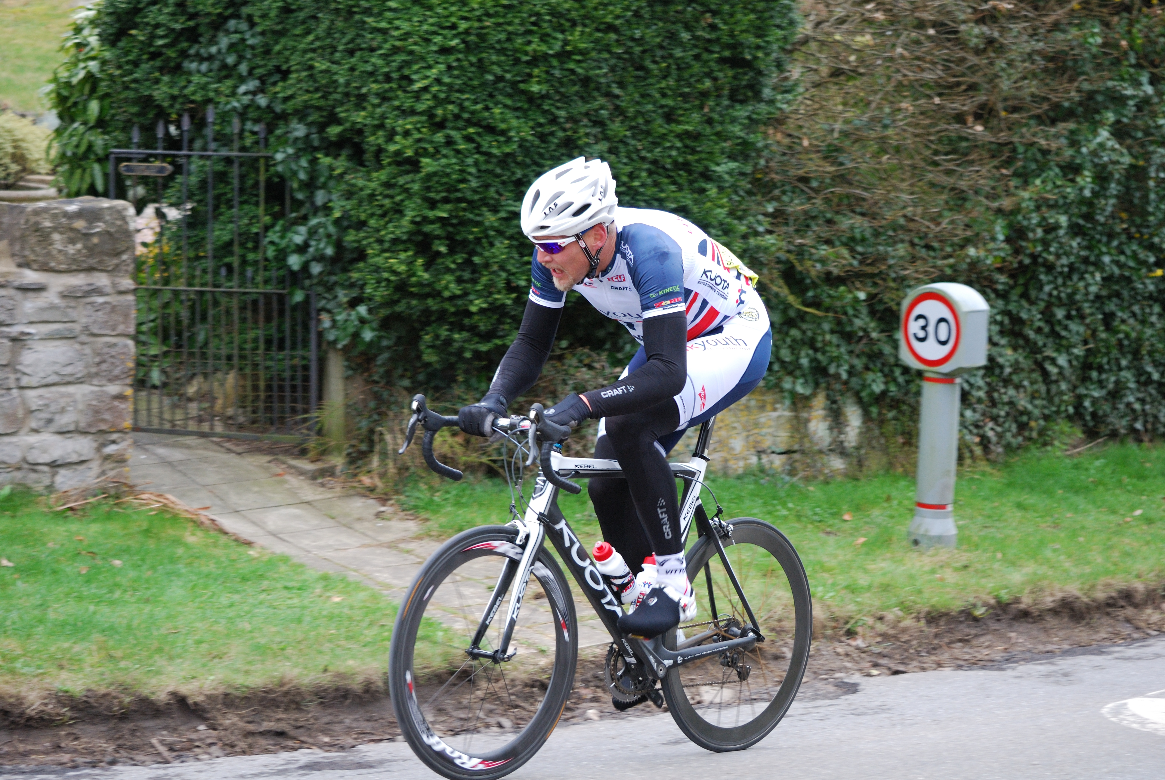 Le coureur cycliste suédois Magnus Bäckstedt en 2011.